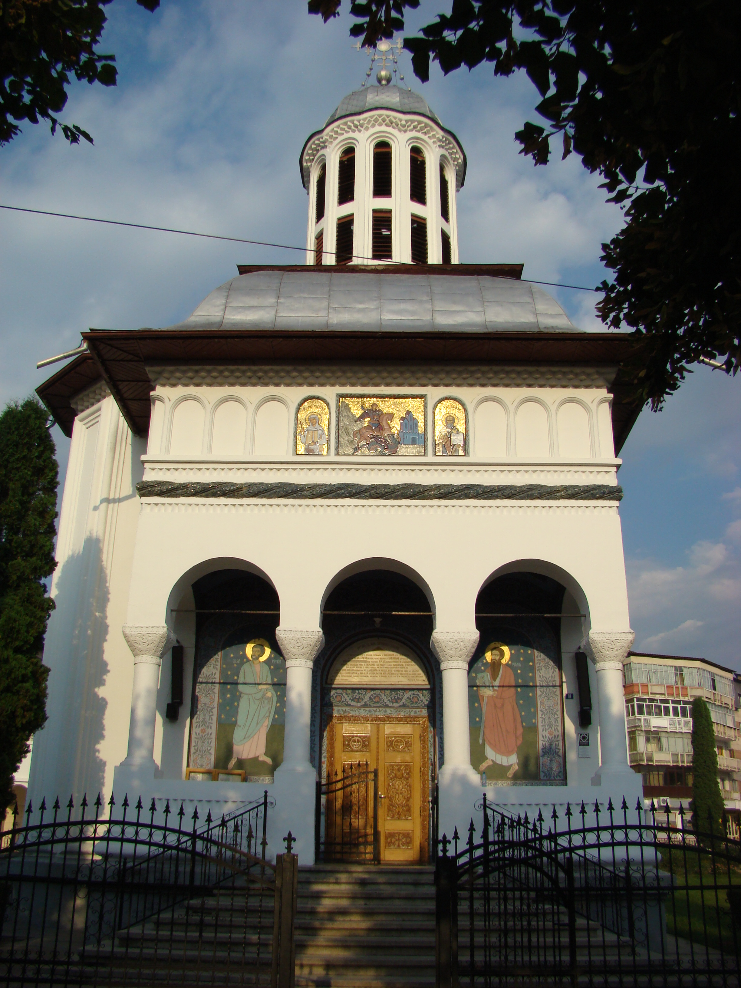 Biserica "Sf. Gheorghe", municipiul Curtea de Argeș, Bd. Basarabilor 91